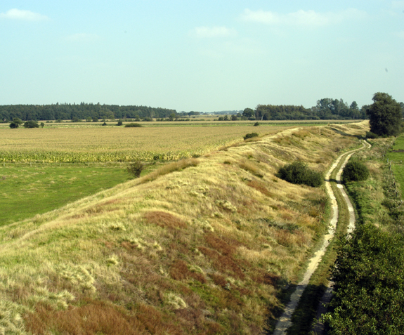 Danewerk: Krummwall westlich Schanze XXI